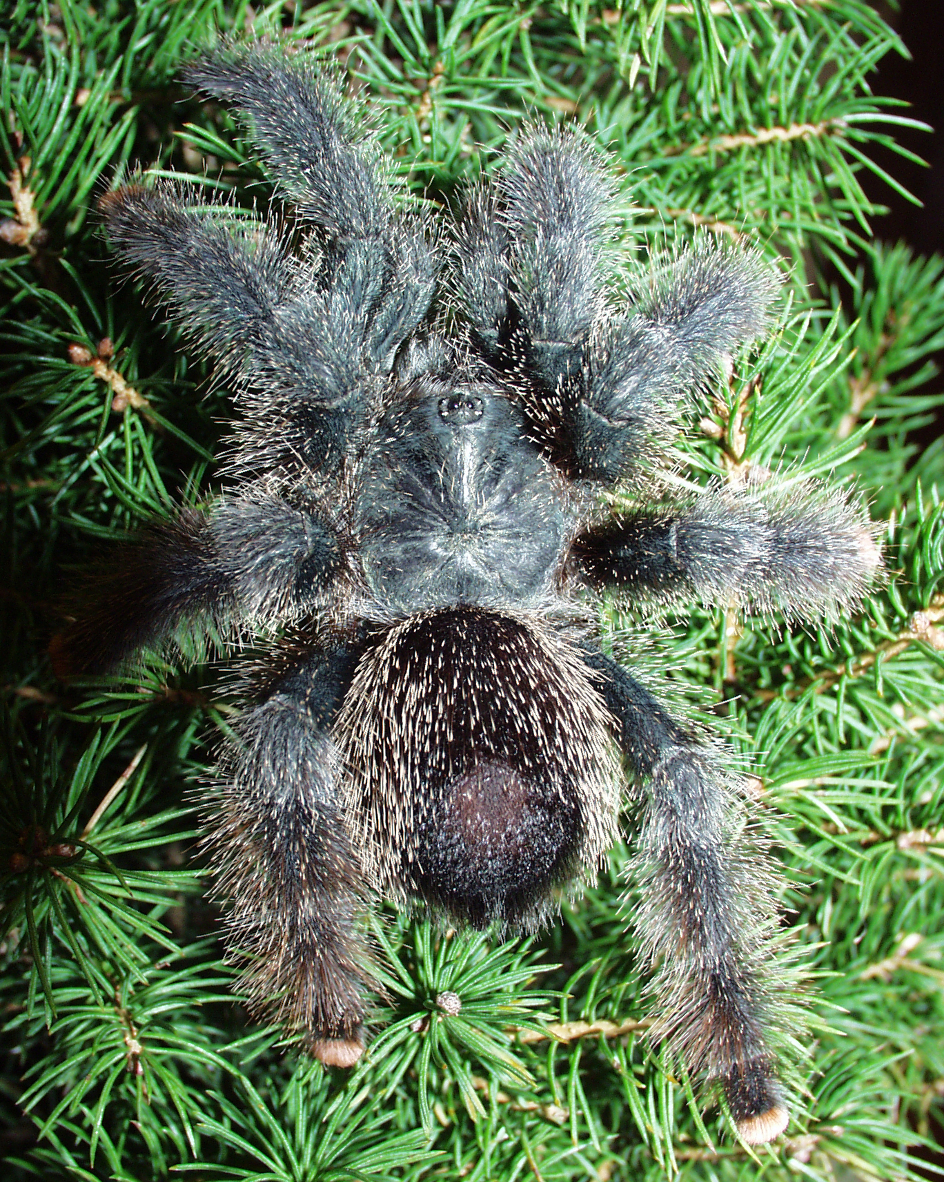 Avicularia sp. Guyana, female oft fälschlich als Metallica bezeichnet